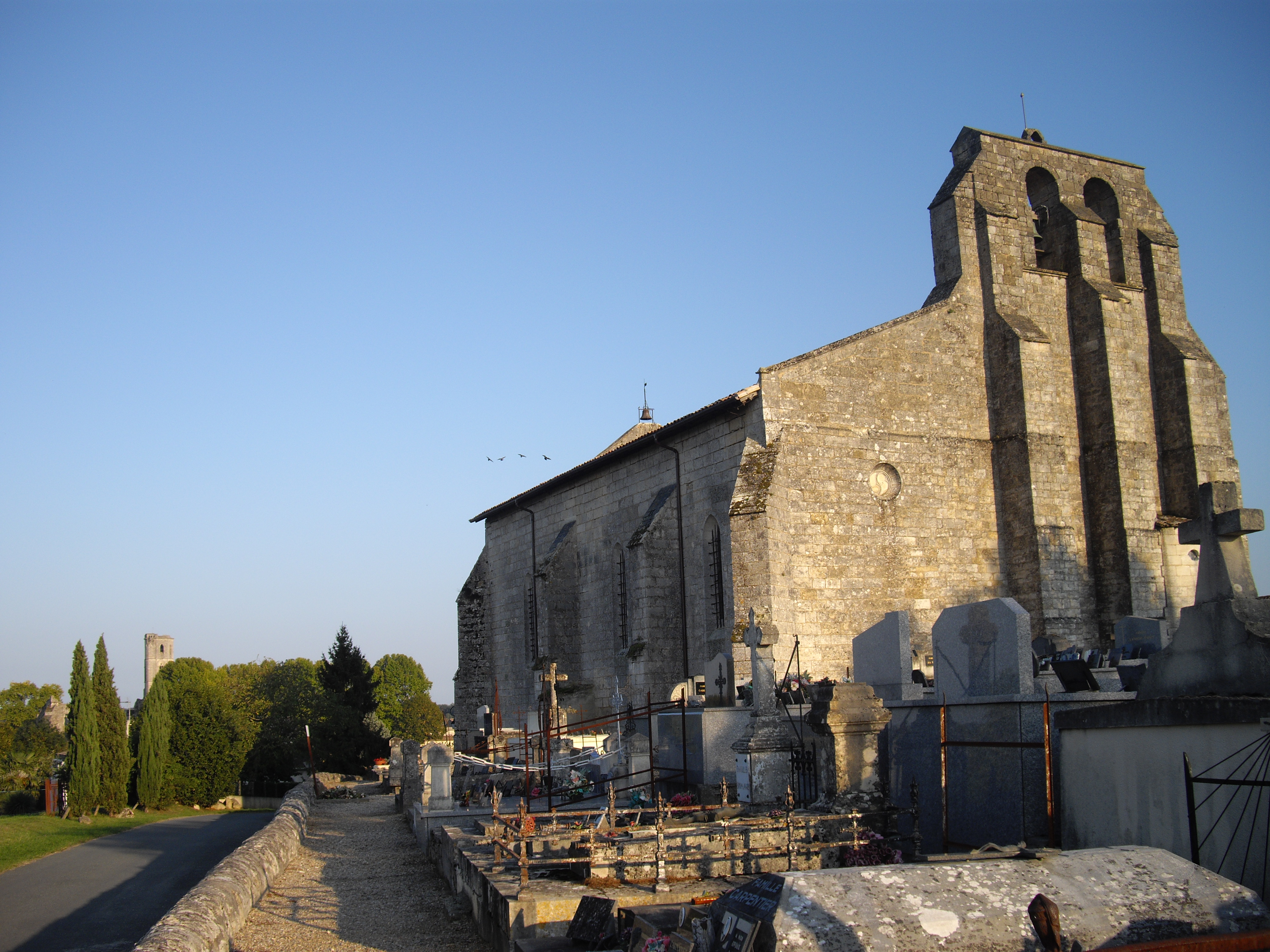 Église Saint-Pierre de La Sauve, Gironde, France